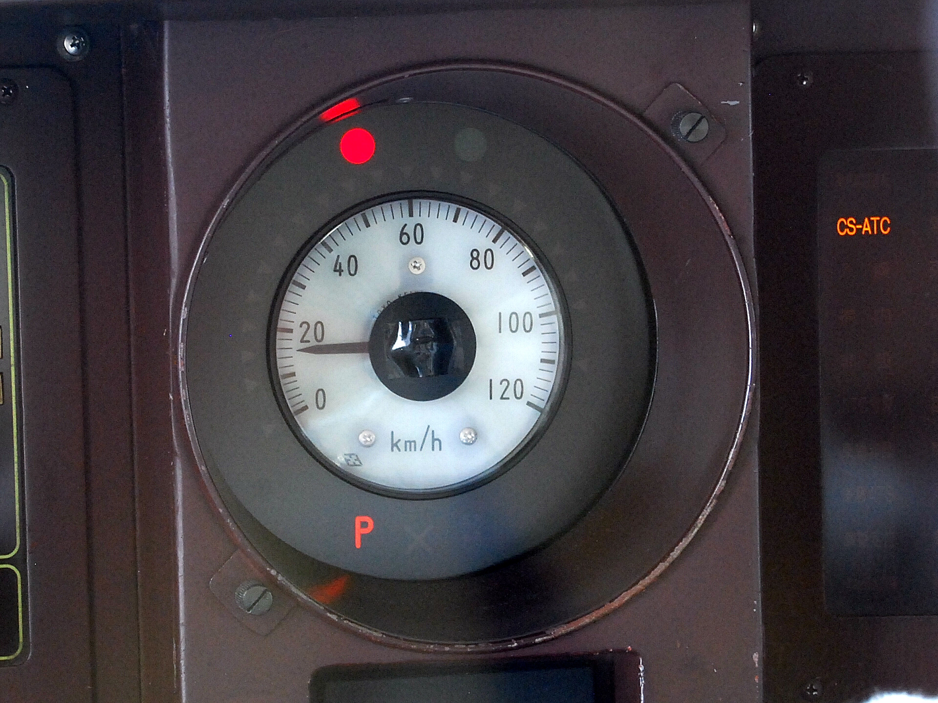 CS-ATCの車内信号表示（乗務員室の窓越しから撮影）